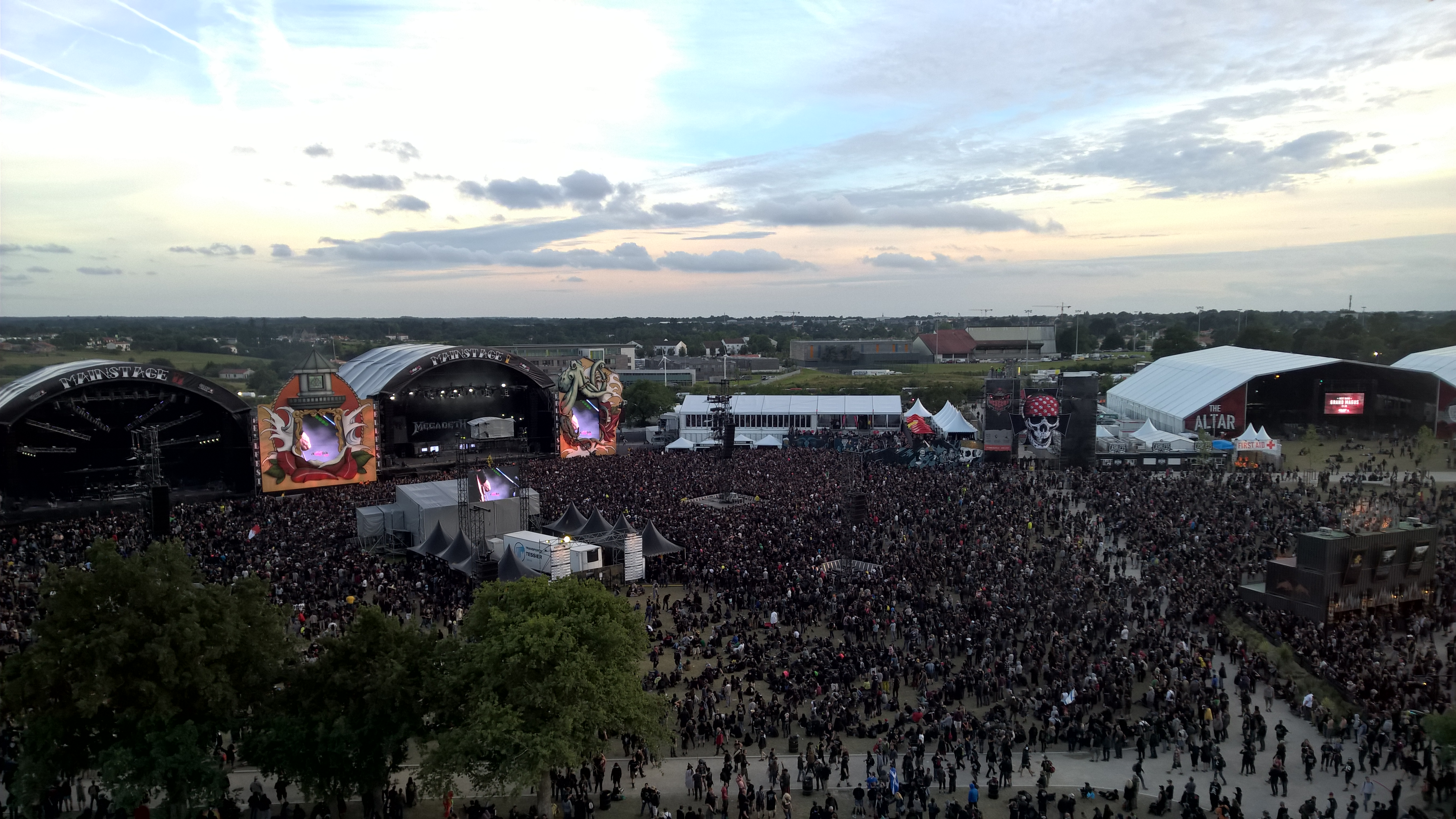 Le Main Square (de g. à d. : les Mainstages, le coin VIP, l'entrée VIP l'Altar, et le Merch), Hellfest 2016.